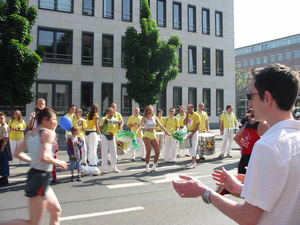 Mainz Marathon 2003, Anfeuerung am Streckenrand